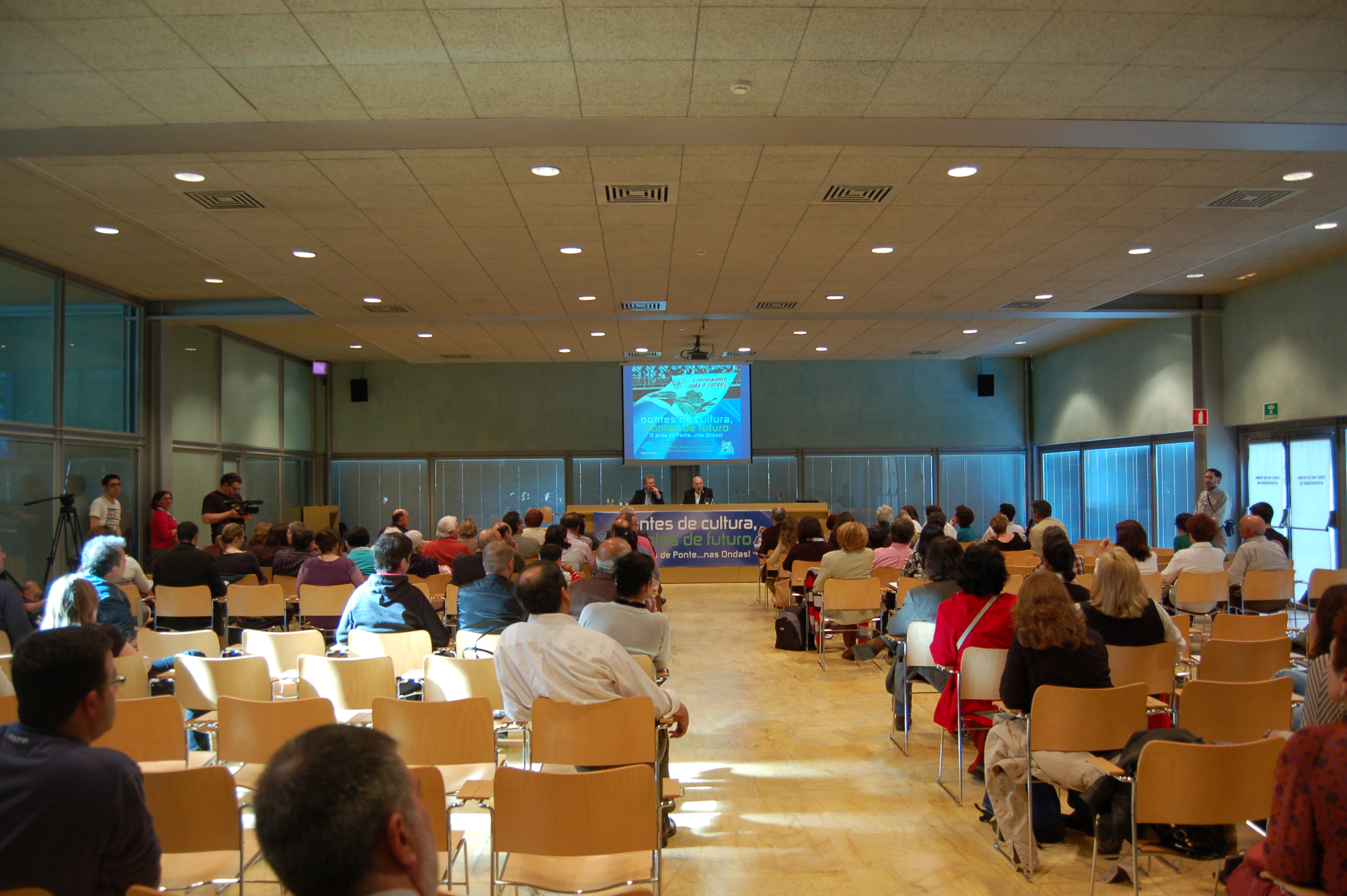 Conferencia de Manuel Campo Vidal no Congreso Pontes de cultura, pontes de futuro, organizado pola asociación Ponte... nas ondas!, celebrado no Verbum - Casa das palabras de Vigo